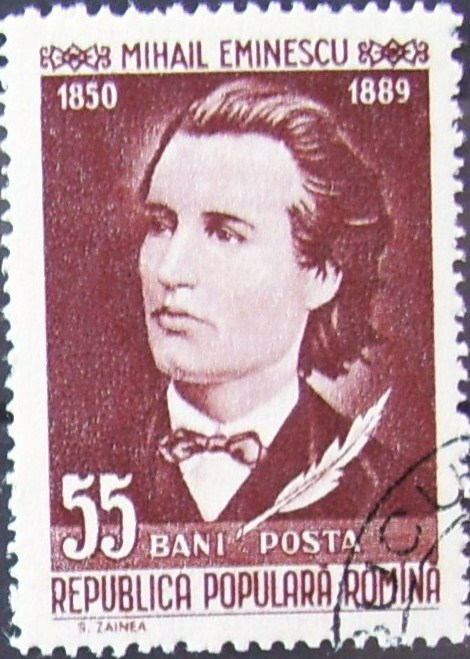 Mihai Eminescu